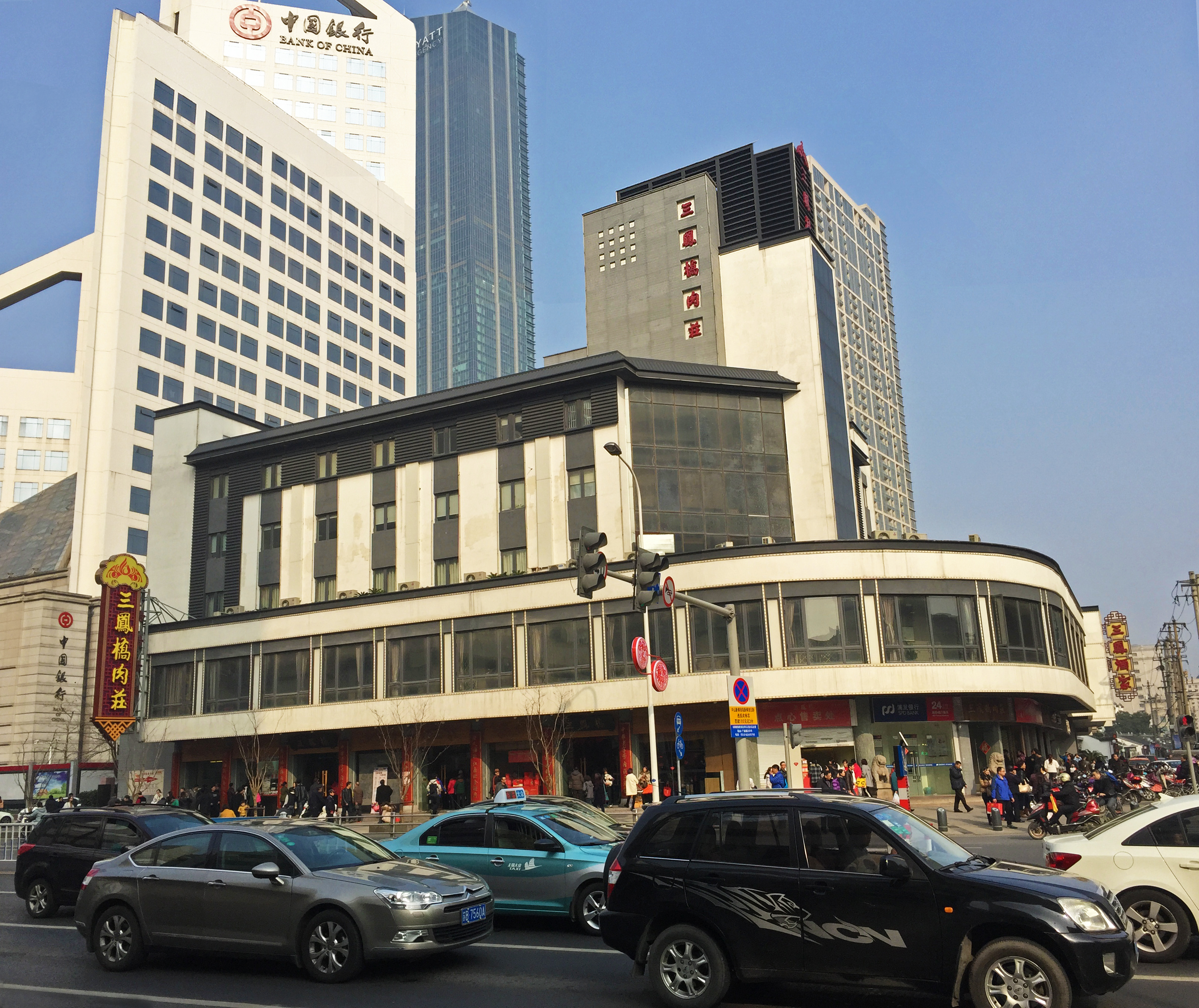 中華老字號之一的無錫三鳳橋肉莊，其產無錫醬排骨广受饕客喜愛。